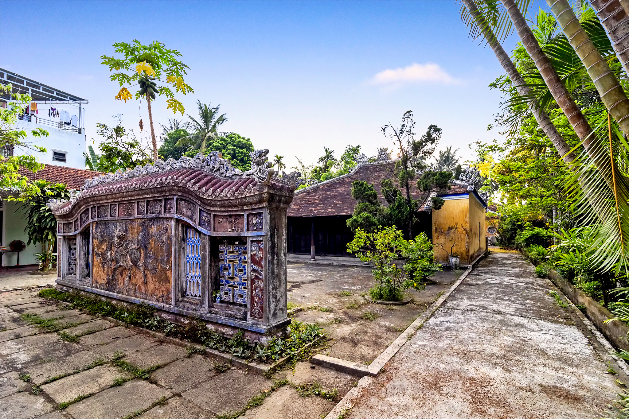 Phủ đệ của Tuy Lý vương (1820 -1897) ở thôn Vỹ Dạ, cố đô Huế, Việt Nam.